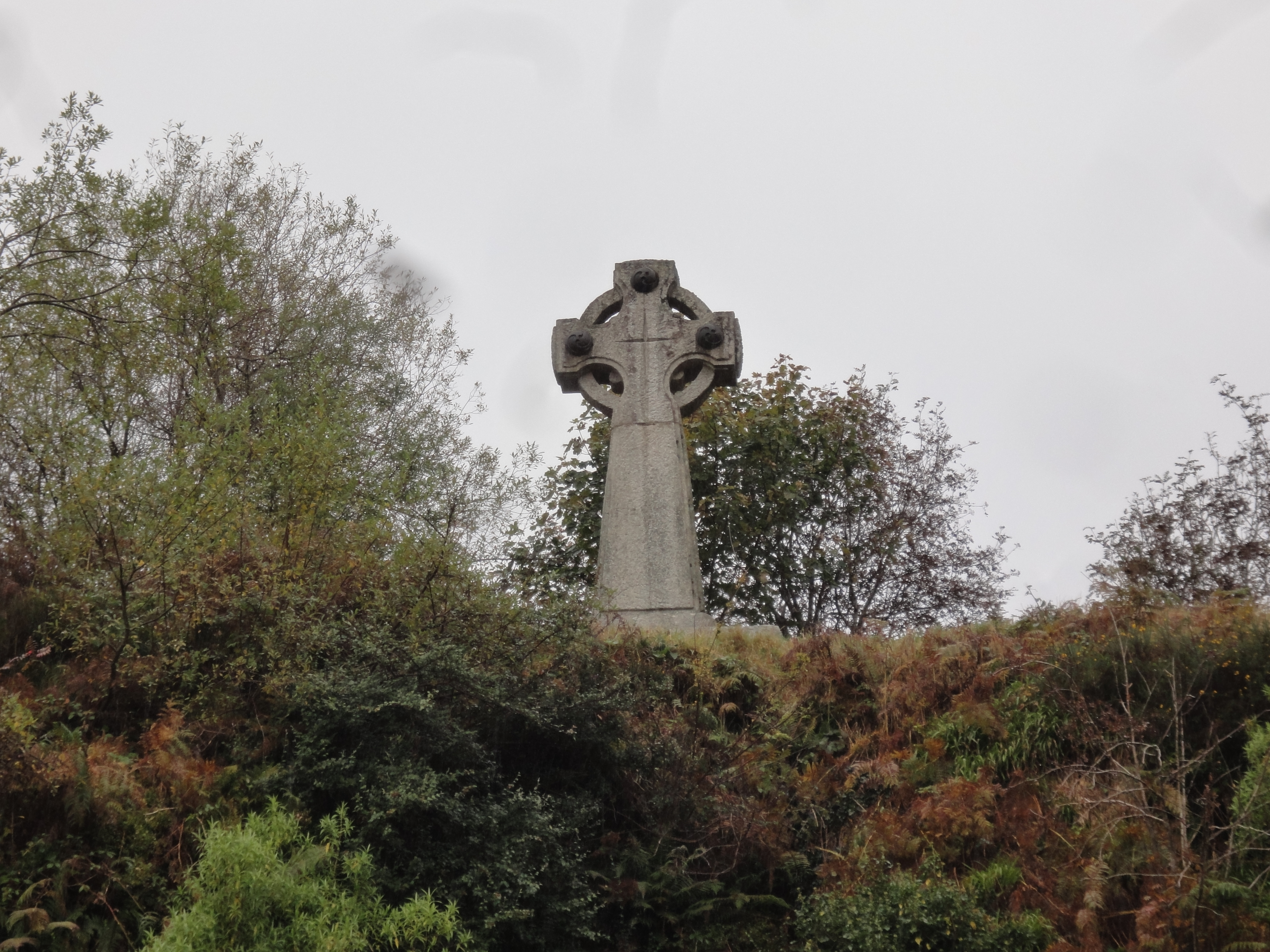 Soldatenfriedhof Glencree - Keltisches Hochkreuz